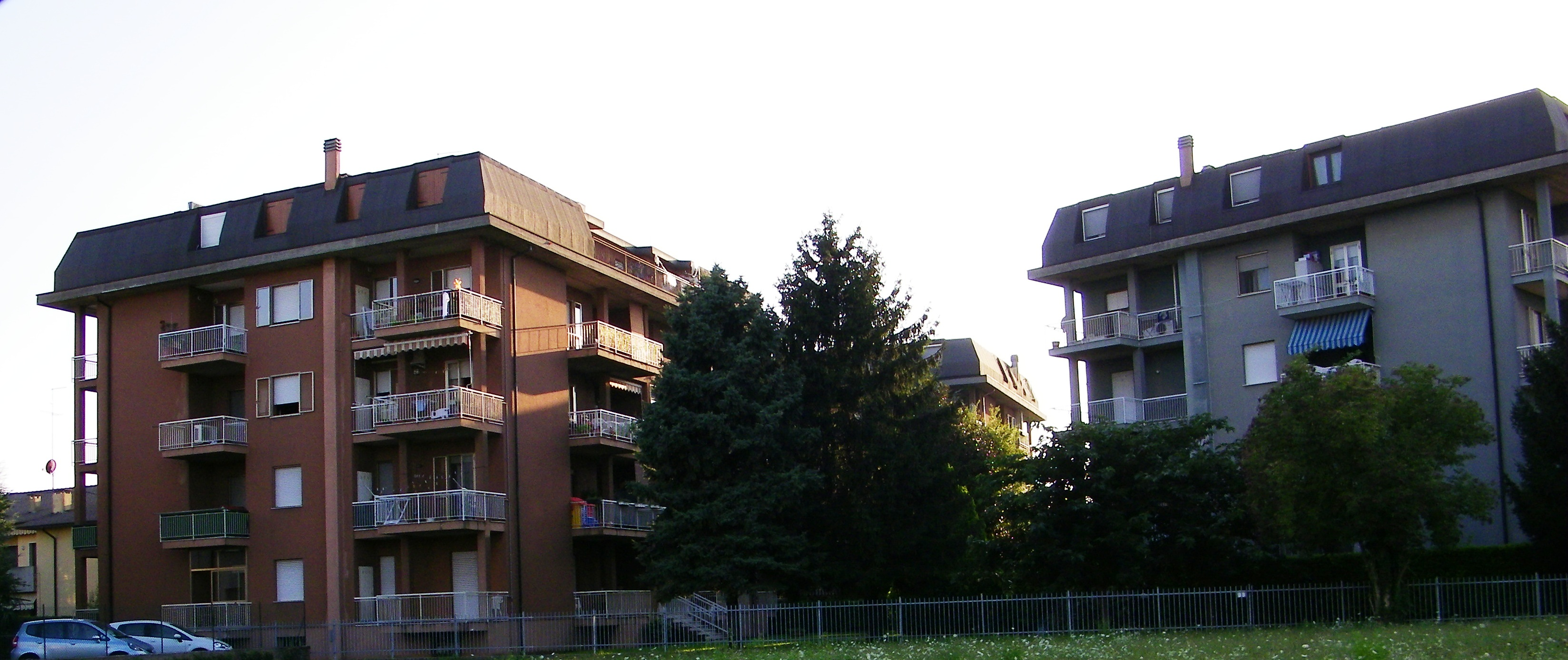 Area residenziale nel quartiere Casella - Bovolone